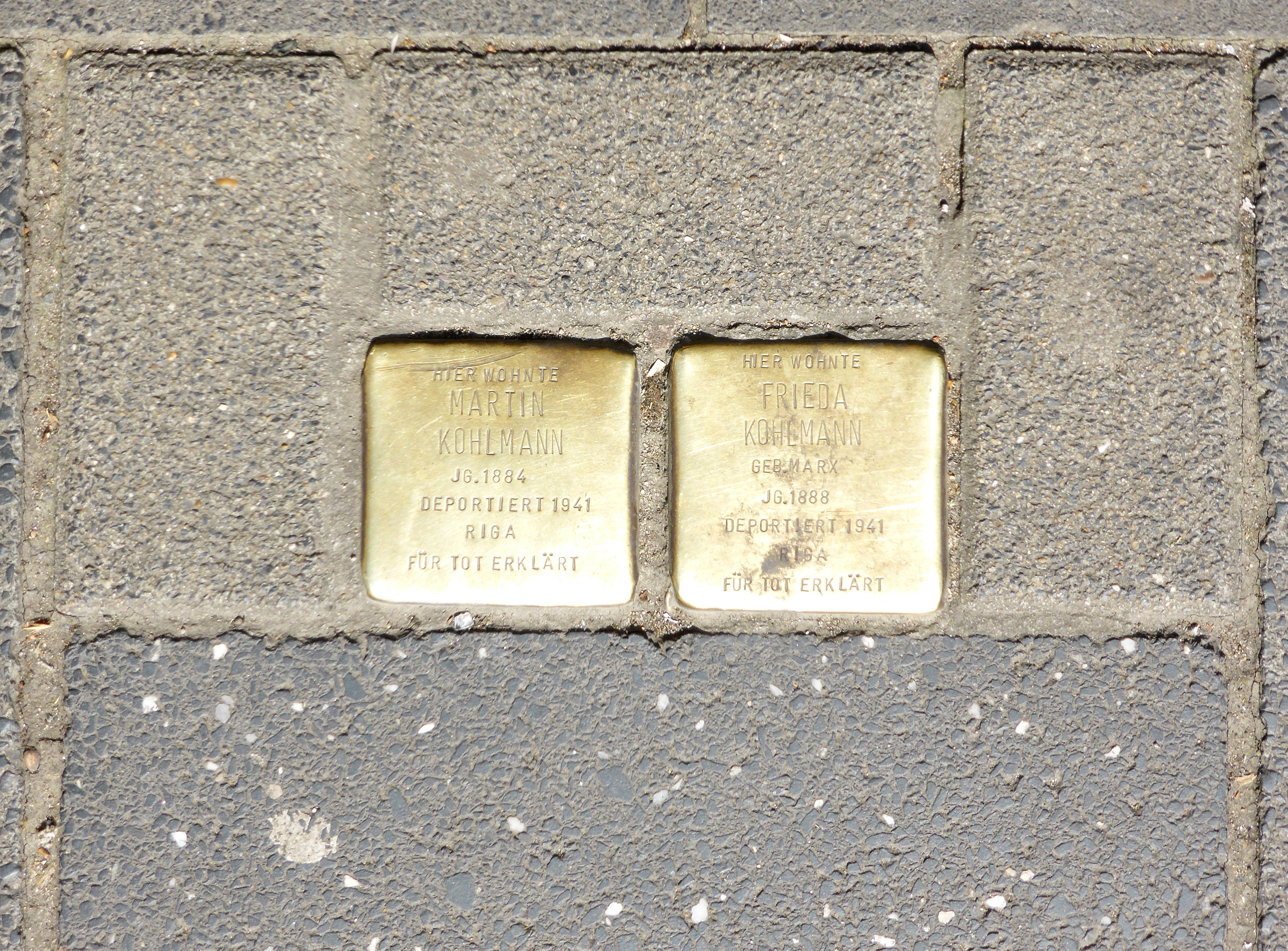 Stolperstein: Verlegestelle Roonstraße 58, Köln.